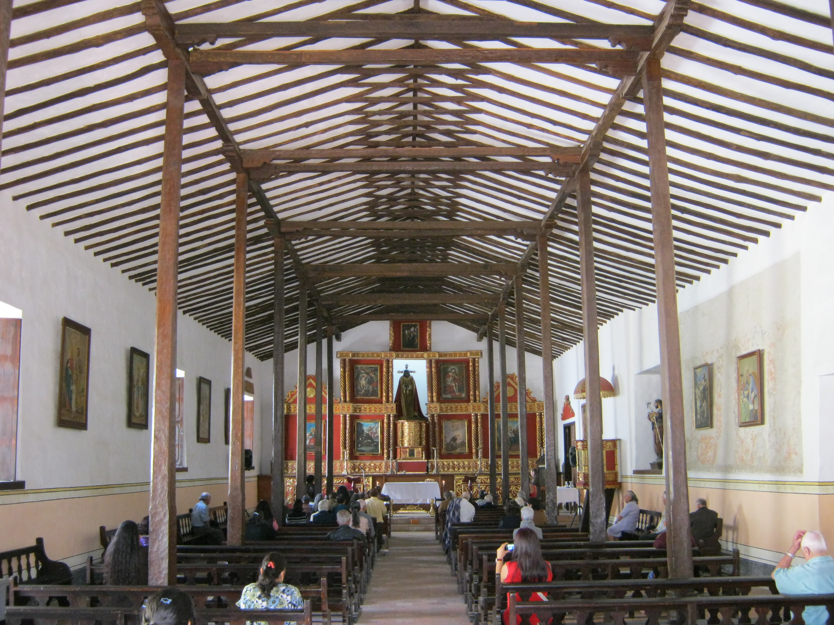 Capilla de Jesús Nazareno, municipio de Marinilla. Colombia.